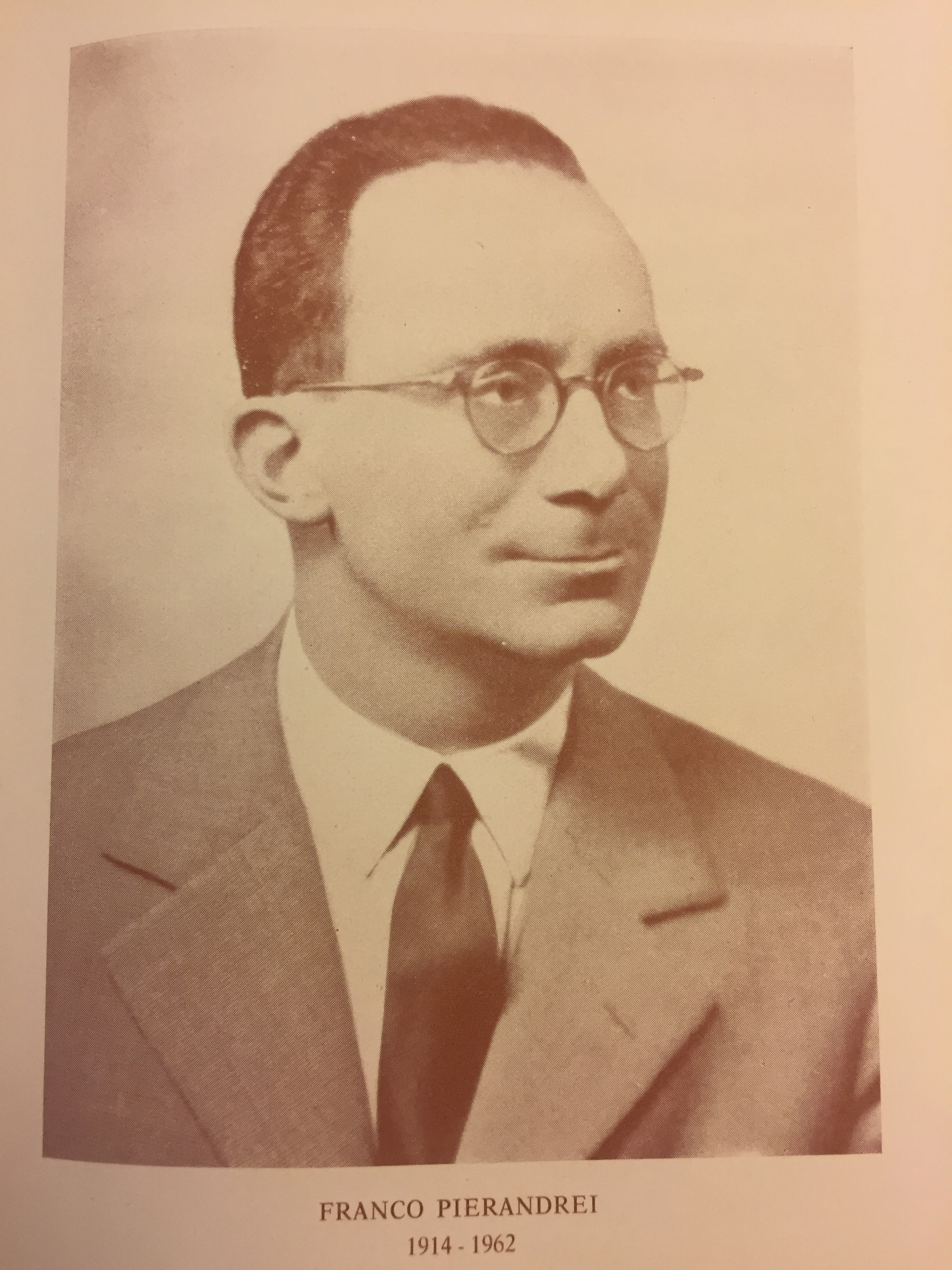 Foto di Franco Pierandrei